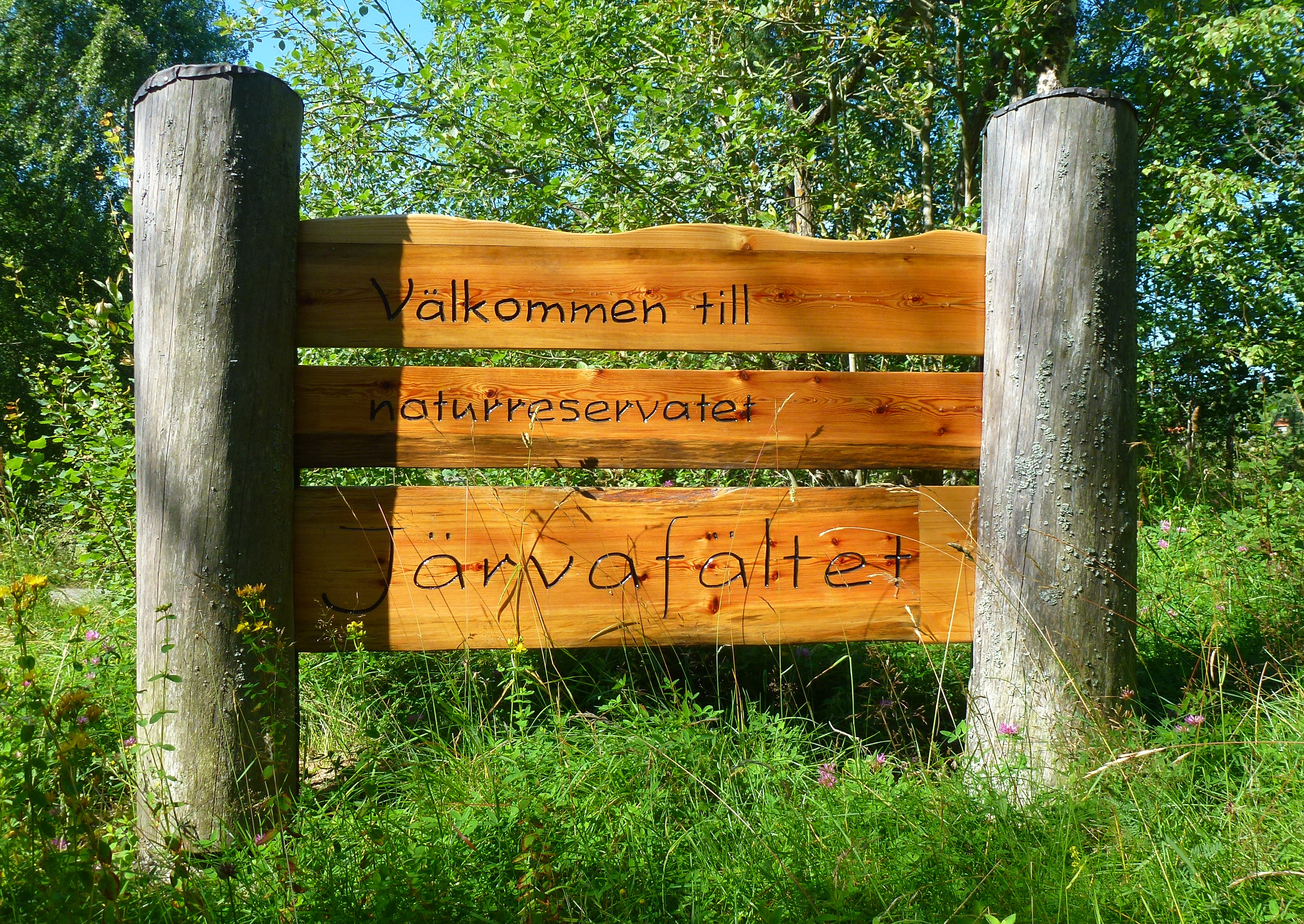 Järvafältets naturreservat skylt vid infarten till Fäboda